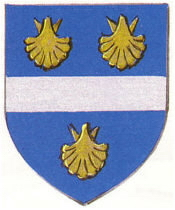 Герб епископа Кошона